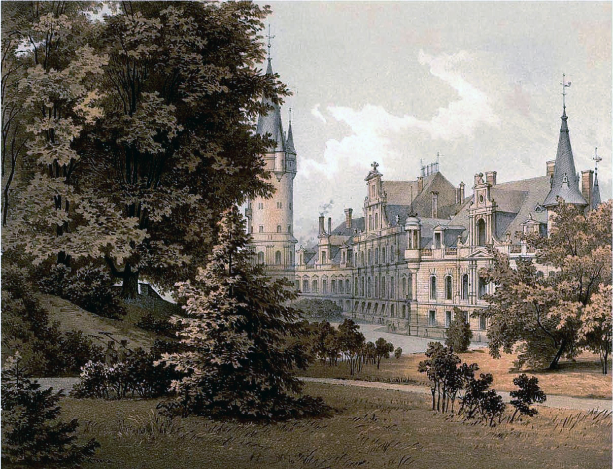 Schloss Eckersdorf, Kreis Namslau, Provinz Schlesien